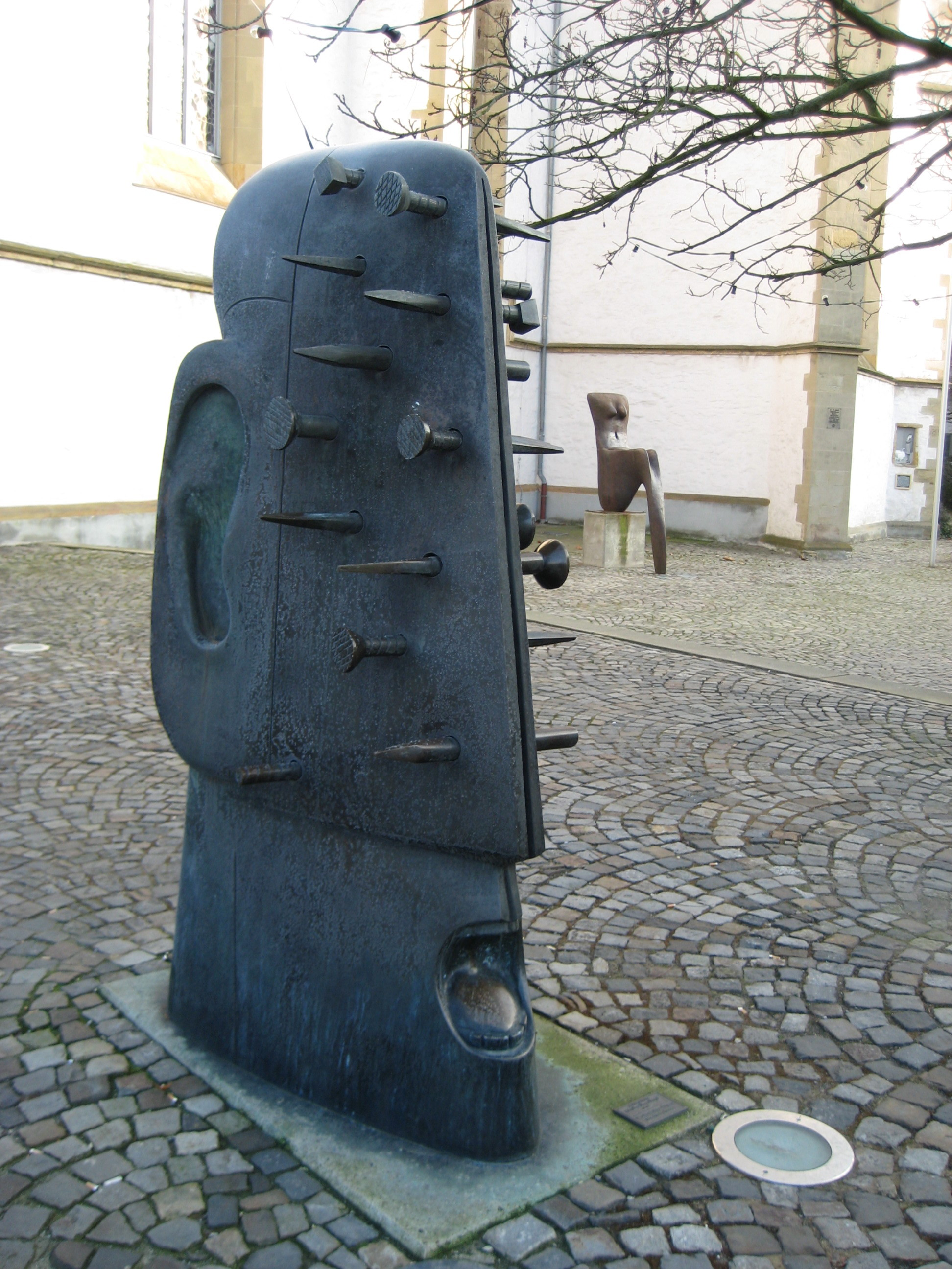 Rainer Kriester (1935-2002): Großer Nagelkopf an der Kunsthalle Dominikanerkirche in Osnabrück, Bronze, 1981/1982